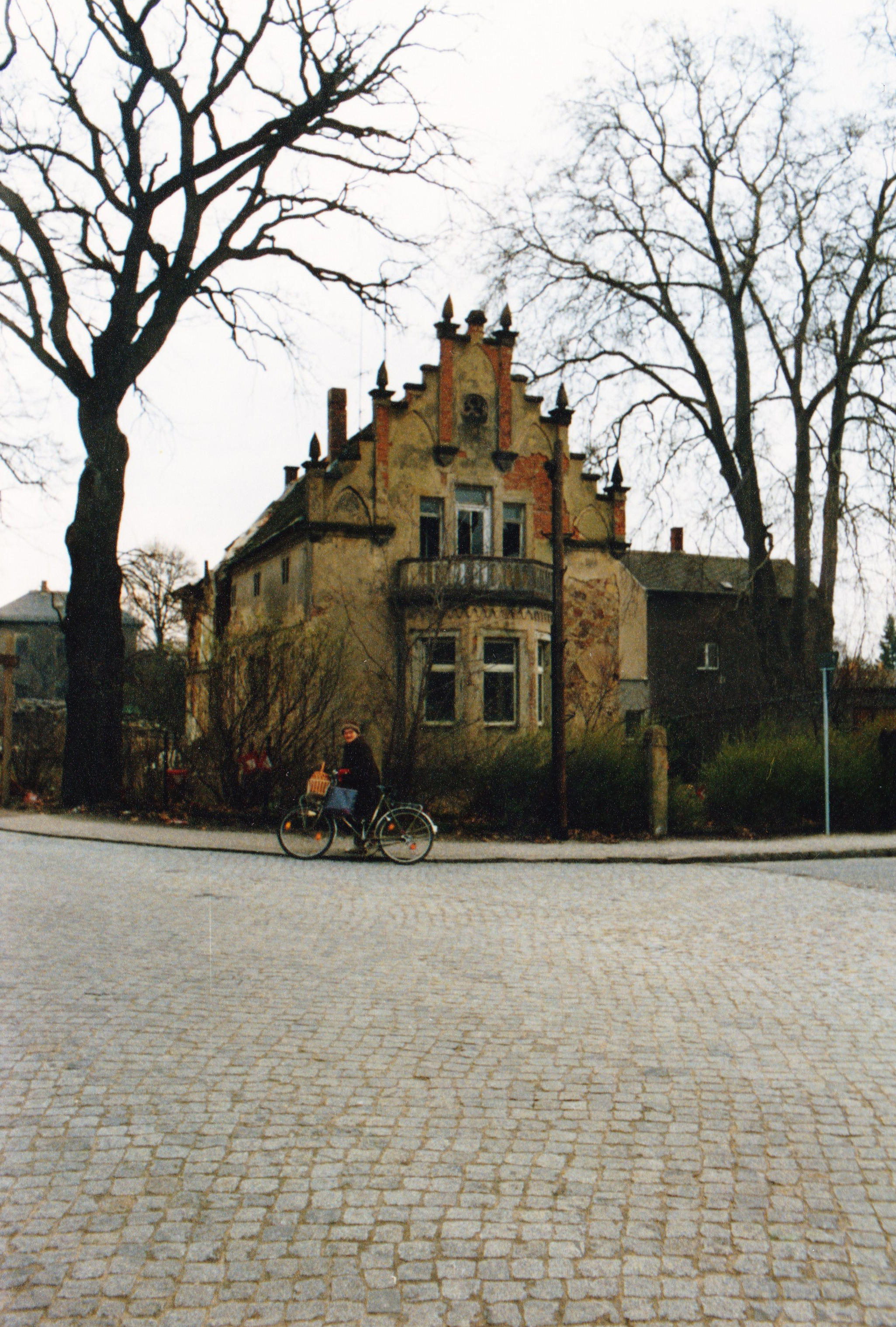 Radebeul-Niederlößnitz, Zillerplatz, Foto 1992. Gotisches Haus (Radebeul)